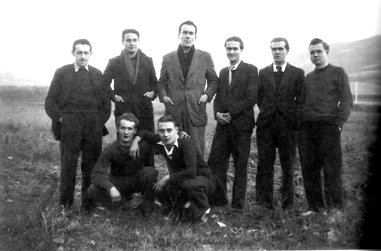 Maquisards dans la montagne de Lure en 1944